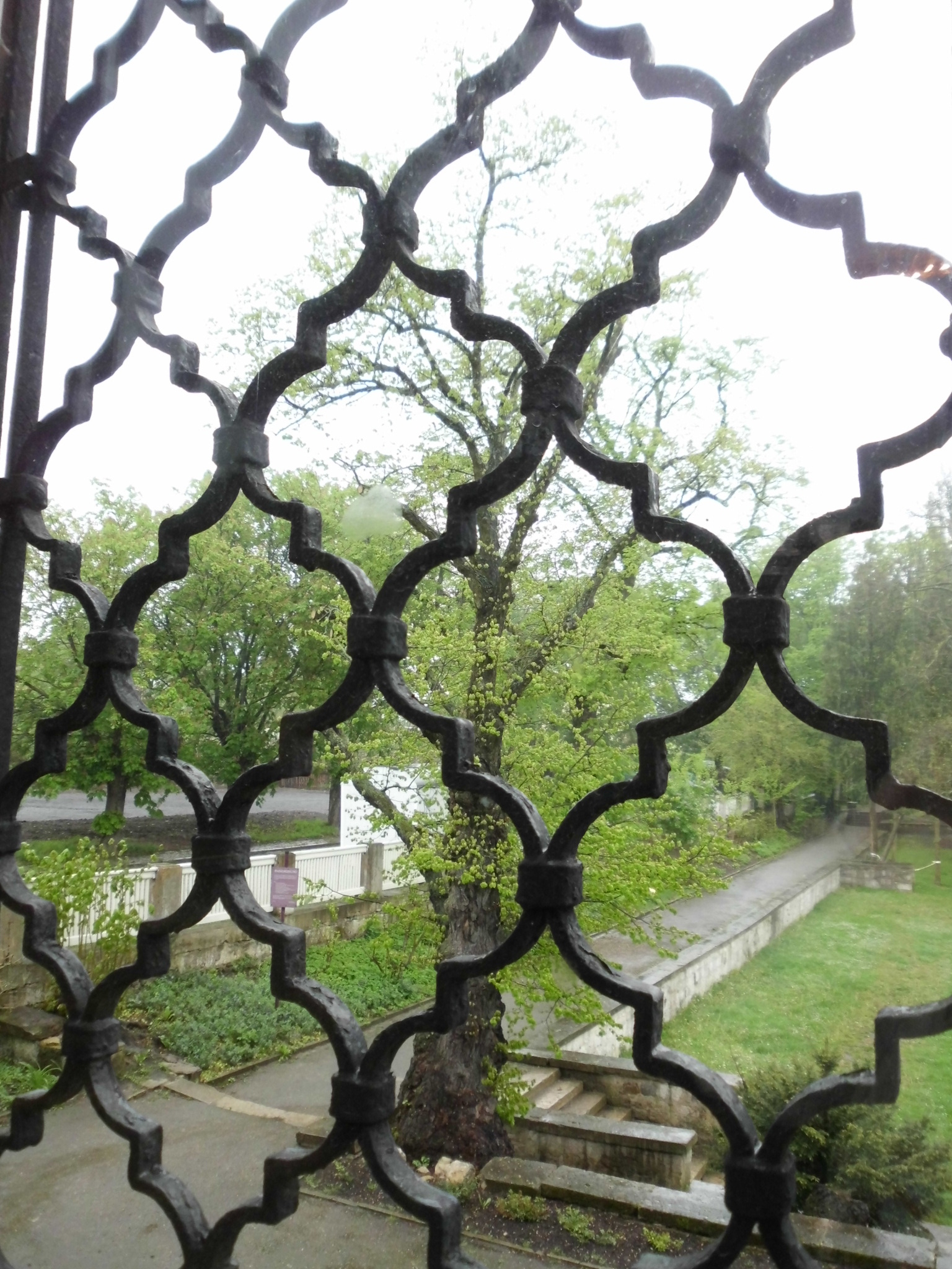 Landgut Holzdorf